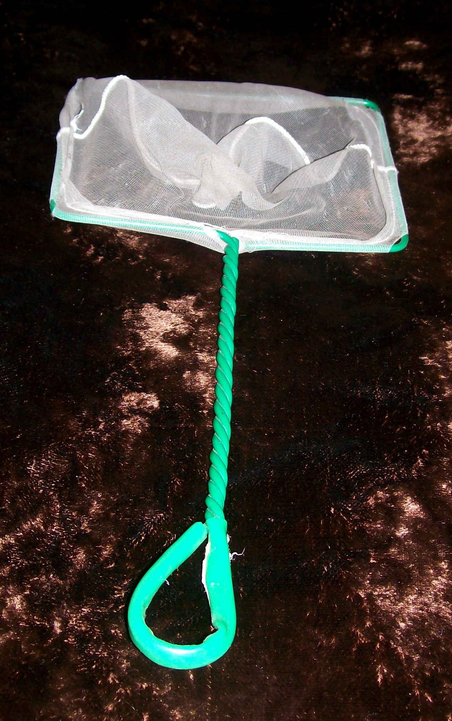 Description:Siatka akwarystyczna. Author:Ewkaa